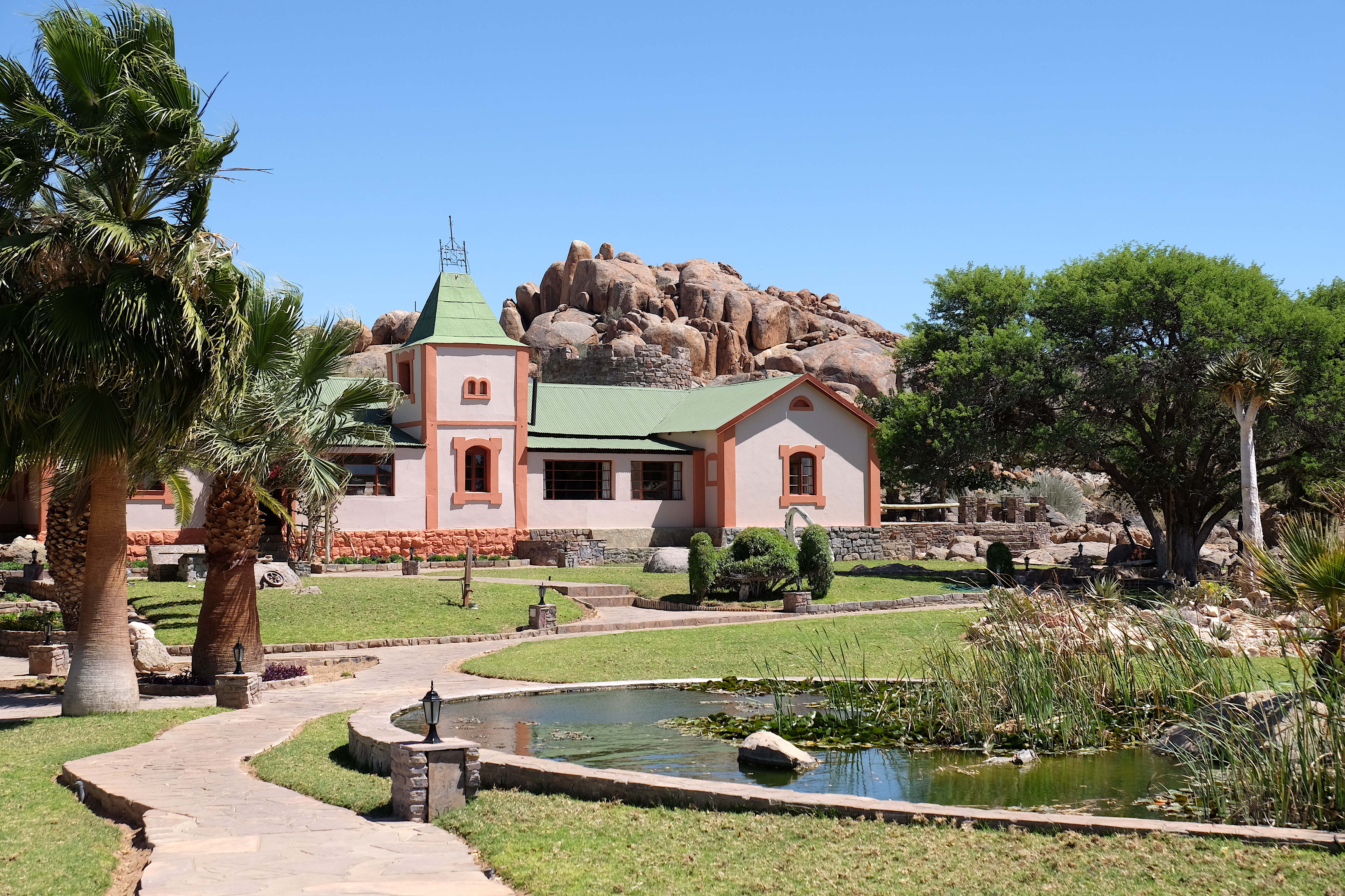 Canyon Lodge Haupteingang (2016)